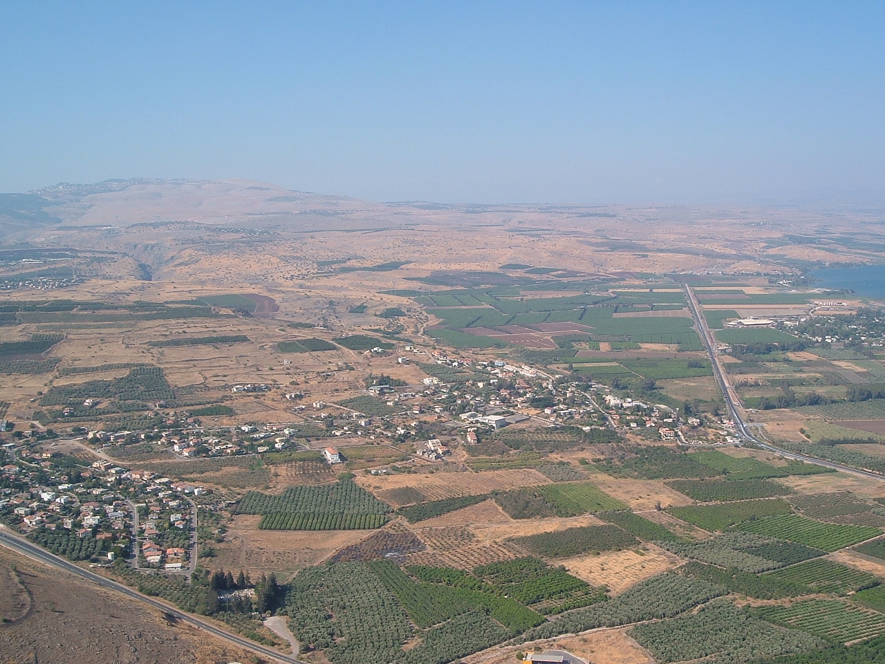 Blick auf Migdal vom Berg Arbel aus Richtung Norden, Aufnahmeort: Tiberias/Berg Arbel